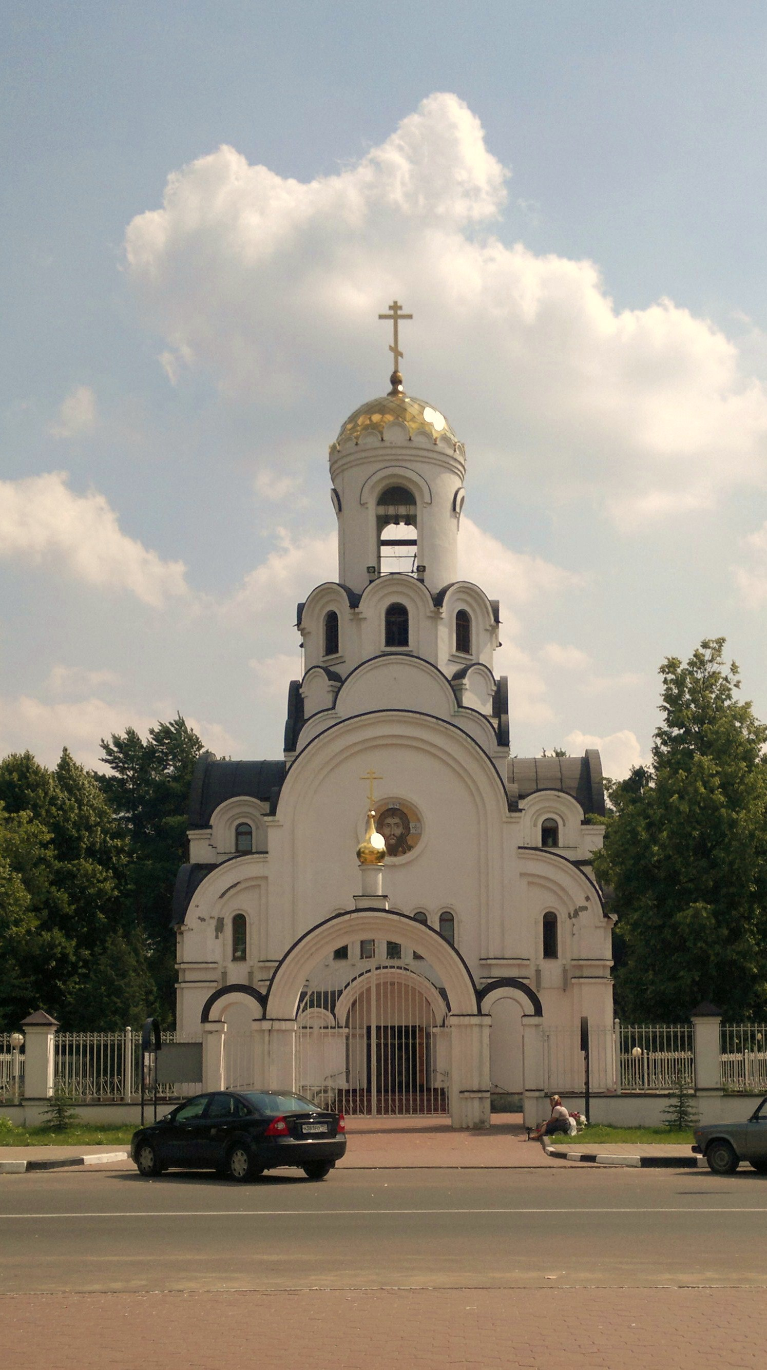 Церковь Рождества Христова во Фрязино.